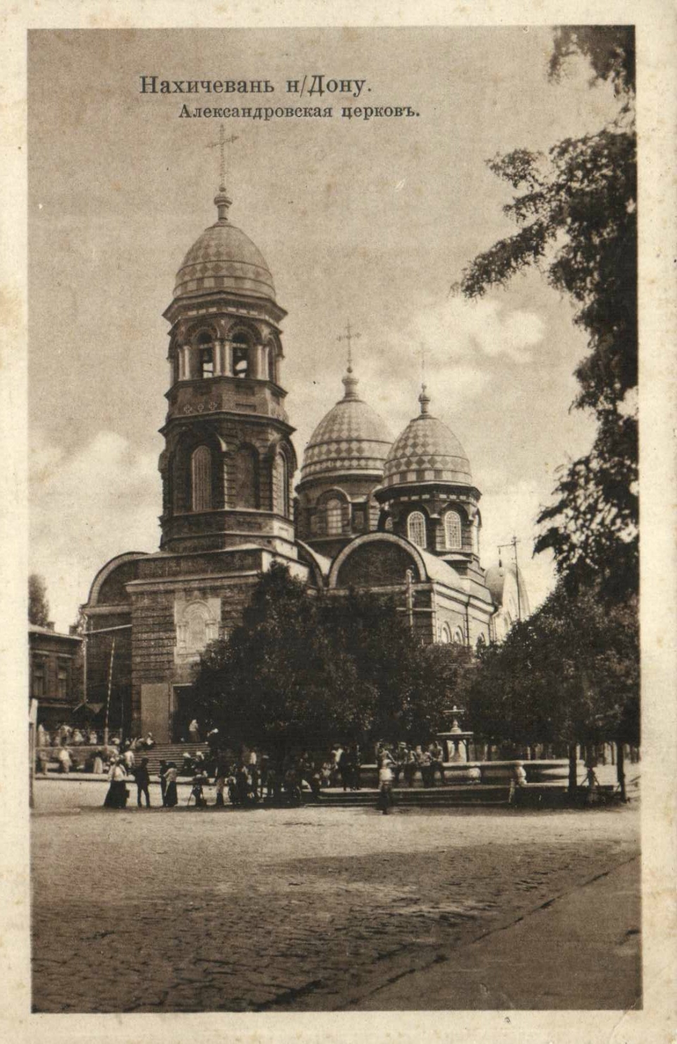 Нахичевань-на-Дону. Александровская церковь